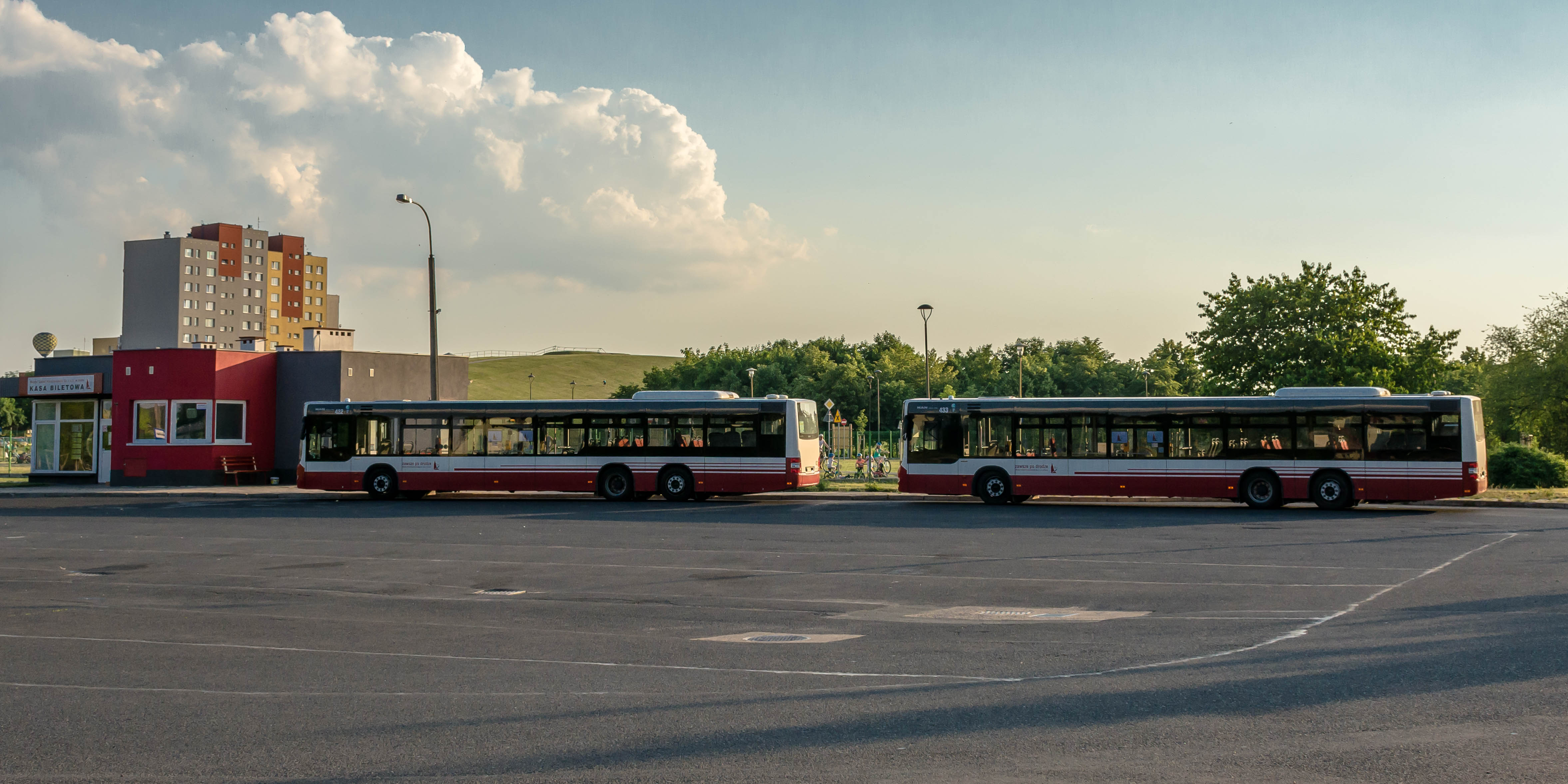 Dwa MANy o nr. 433 oraz 432 na pętli przy ul. Pużaka.